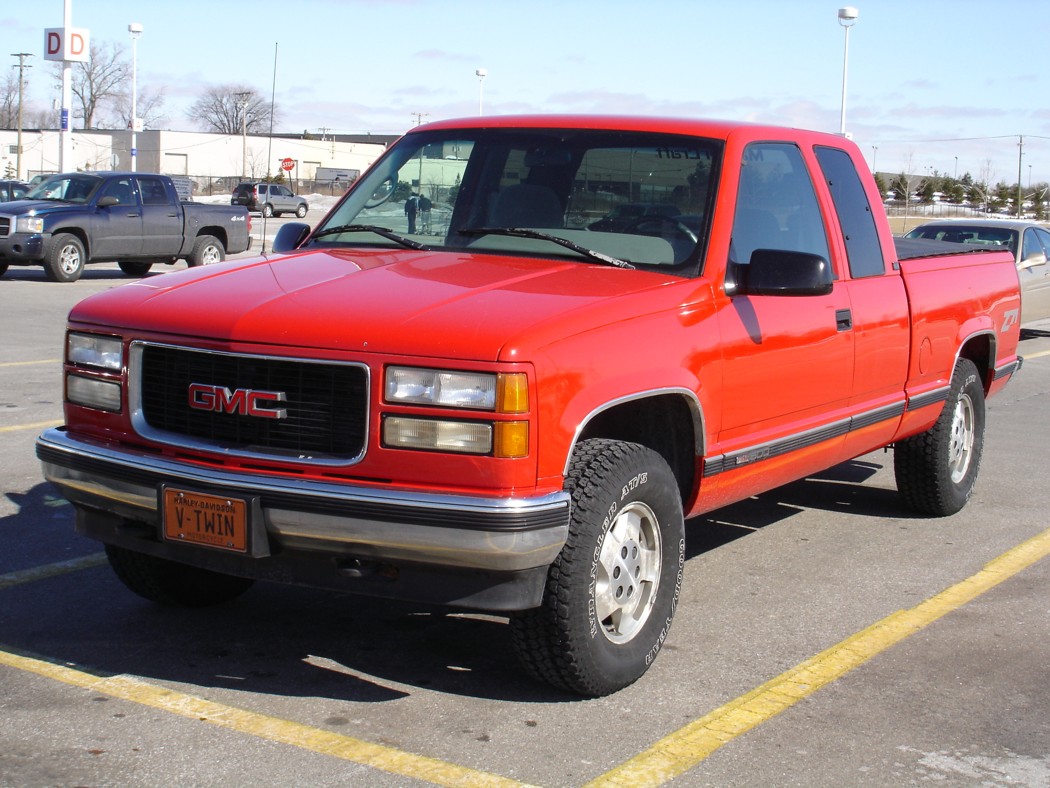 1996 GMC Sierra